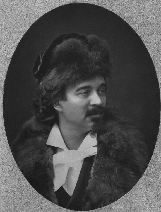 Портрет Валерия Ивановича Якоби (1834-1902). Фотография.